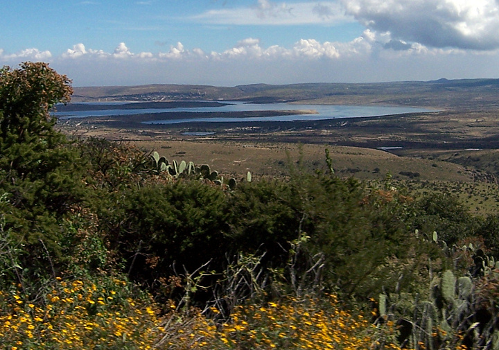 Presa Calles desde la congoja